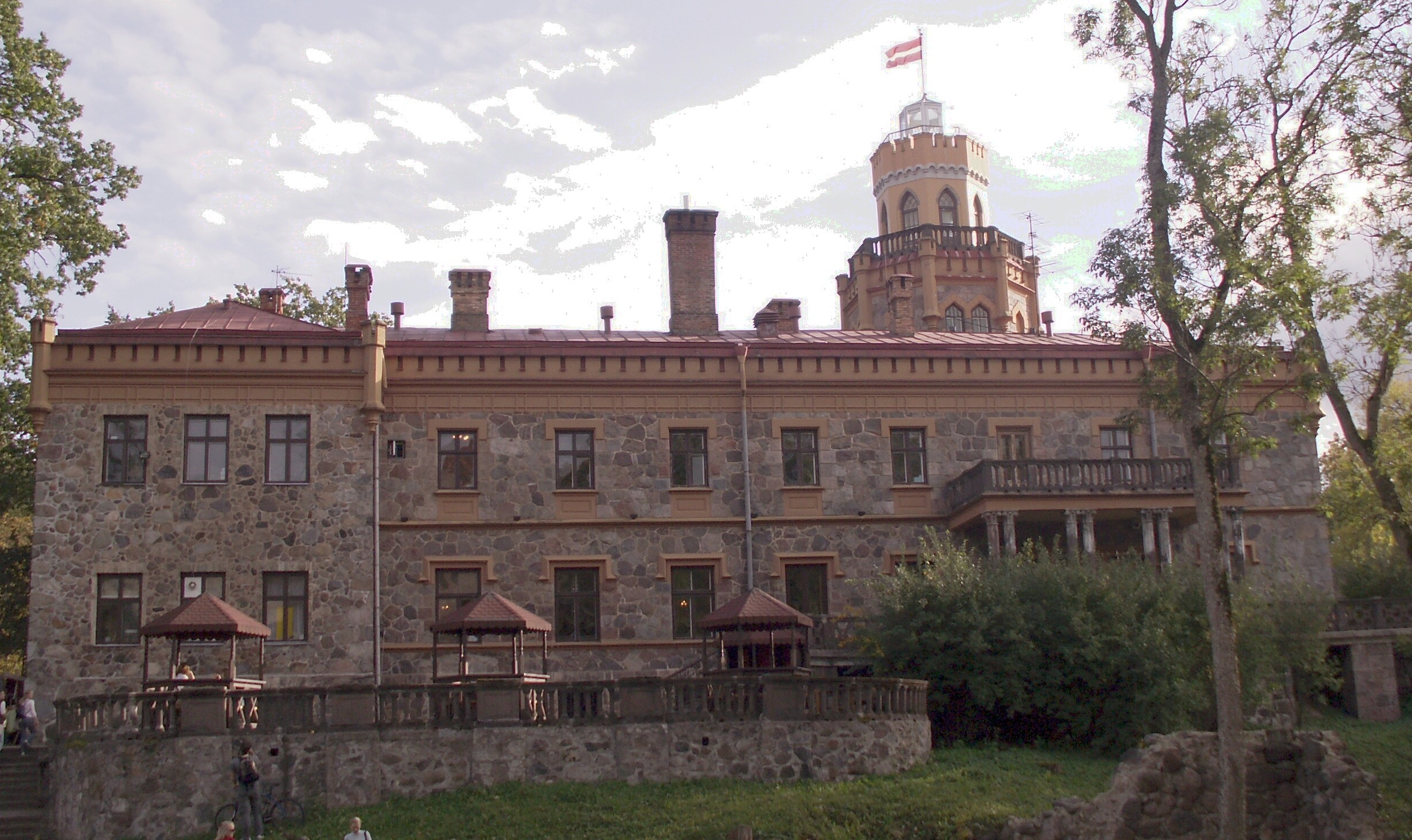 Naujoji pilis. Sigulda